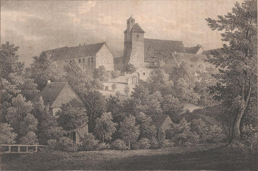 Schloss Ilsenburg, Lithographie : 18 x 12 cm, Heinrich Wilhelm Teichgräber